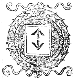 Herb Bogoria z "Kleynoty abo herby państwa y rycerstwa powiatow y miast głownych Korony Polskiey y W. X. L. według obiecadła dla pamięci łacnieyszey położone" wydanego w 1630 , napisanego przez Gorczyna Jana Aleksandra